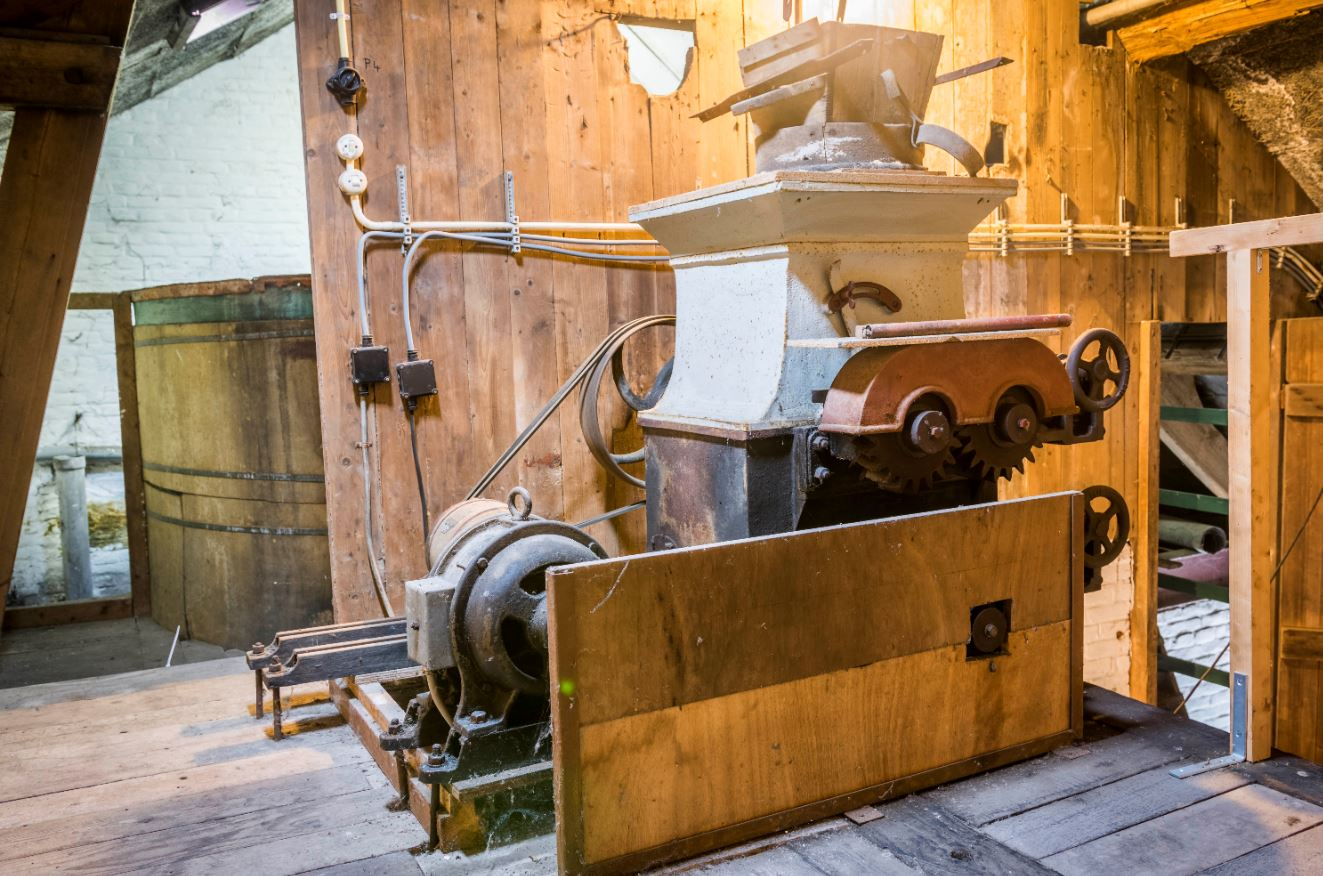 Schrotmühle